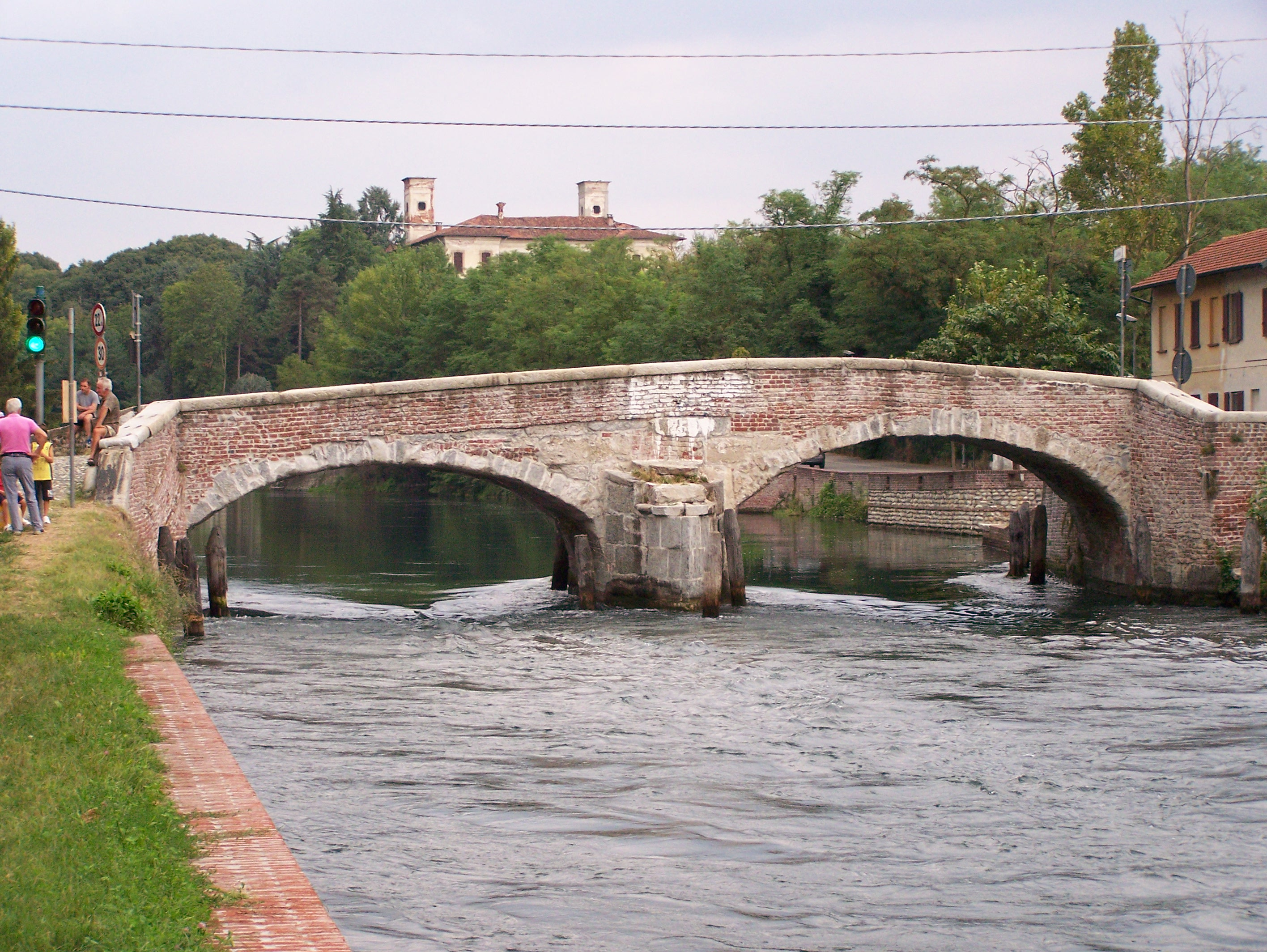 Ponte sul Naviglio Grande a Castelletto di Cuggiono (MI) - Italy